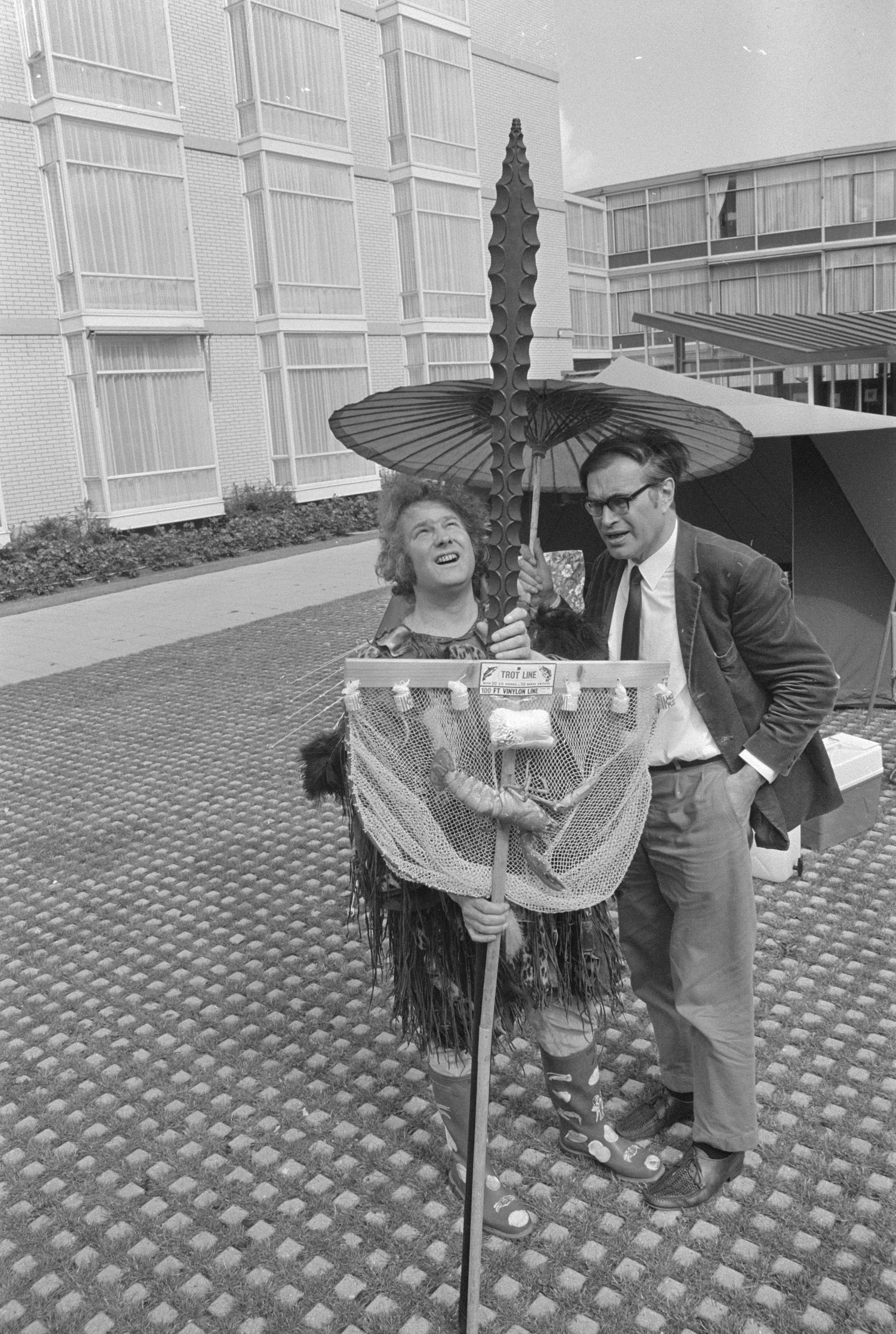 Collectie / Archief : Fotocollectie Anefo Reportage / Serie : [ onbekend ] Beschrijving : Persconferentie van Jan Wolkers en Godfried Bomans ov verblijf op Rottumerplaat 10 tot 24 juli, in Apollohotel Amsterdam Datum : 30 juni 1971 Locatie : Amsterdam, Noord-Holland Trefwoorden : persconferenties Persoonsnaam : Bomans, Godfried, Wolkers, Jan Fotograaf : Mieremet, Rob / Anefo Auteursrechthebbende : Nationaal Archief Materiaalsoort : Negatief (zwart/wit) Nummer archiefinventaris : bekijk toegang 2.24.01.05 Bestanddeelnummer : 924-6900